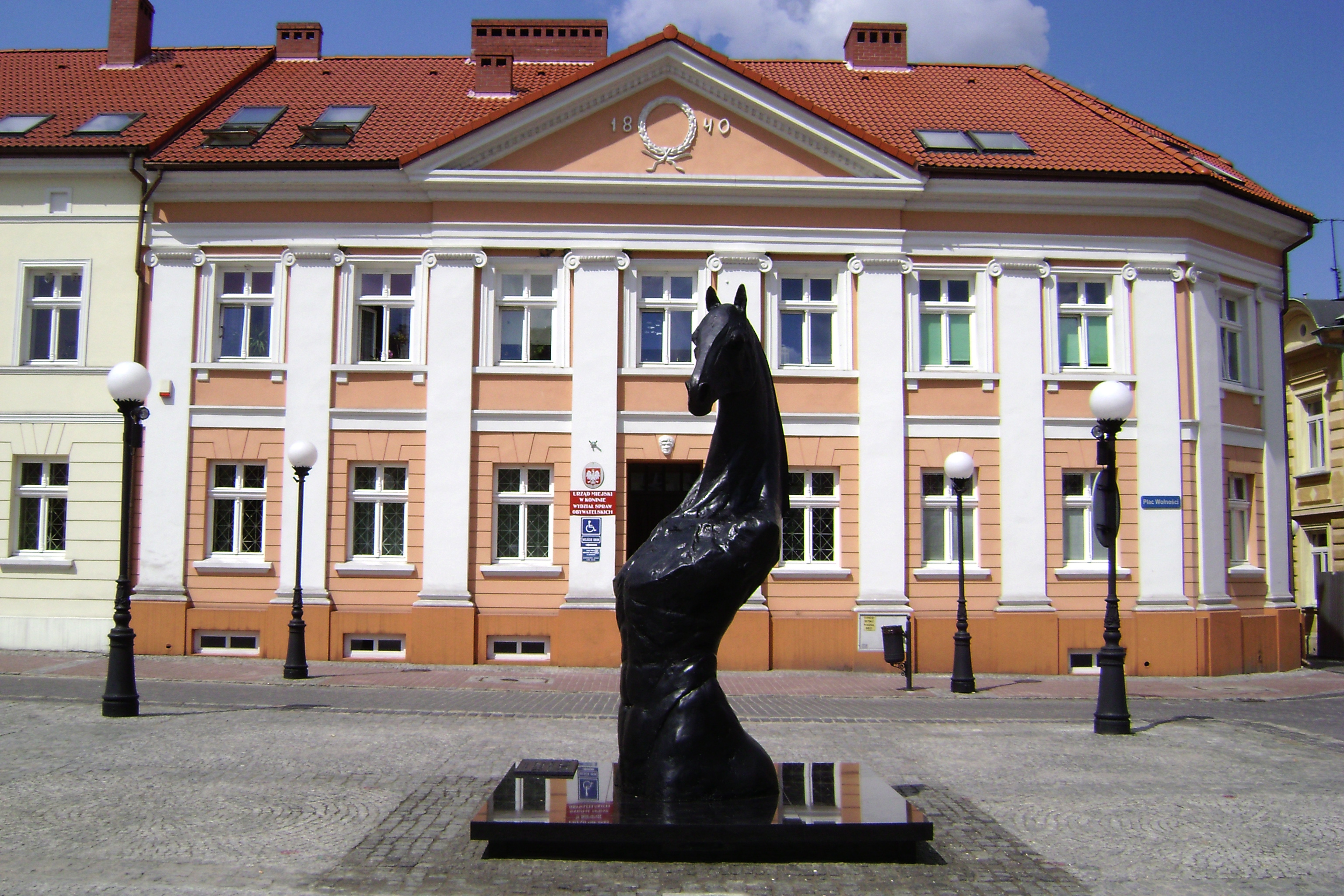 Kamienica Koliber w Koninie